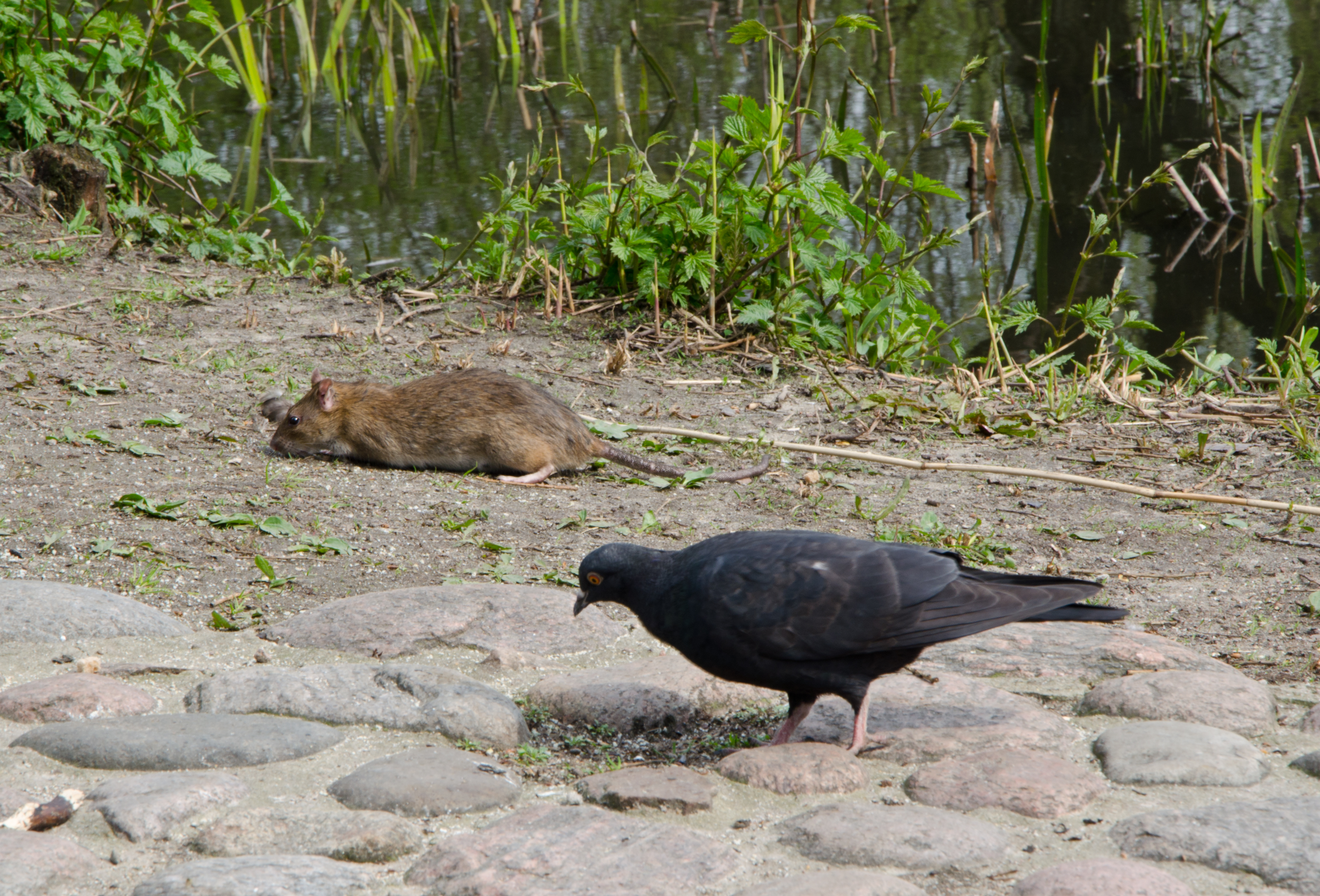 Ratte mit Taube, gesehen an einem Teich in Hamburg